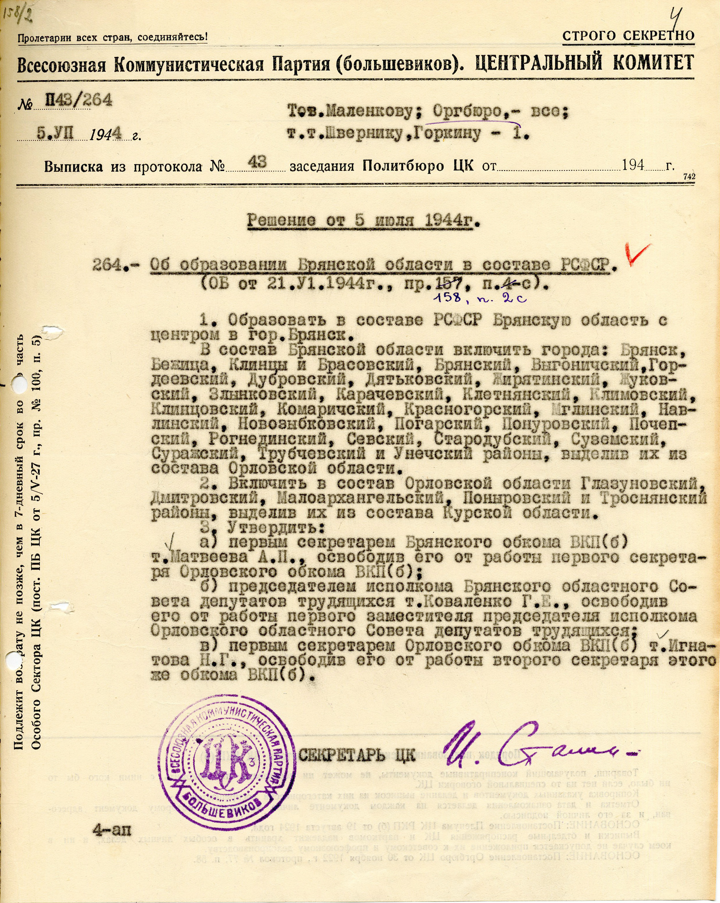 Выписка из протокола N 43 заседания Политбюро ЦК, содержащая решение ЦК ВКП(б) от 5 июля 1944 г "Об образовании Брянской области в составе РСФСР", указания на изменения границ Курской и Орловской областей, назначение первым секретарем Брянского обкома ВКП(б) Матвеева А.П.